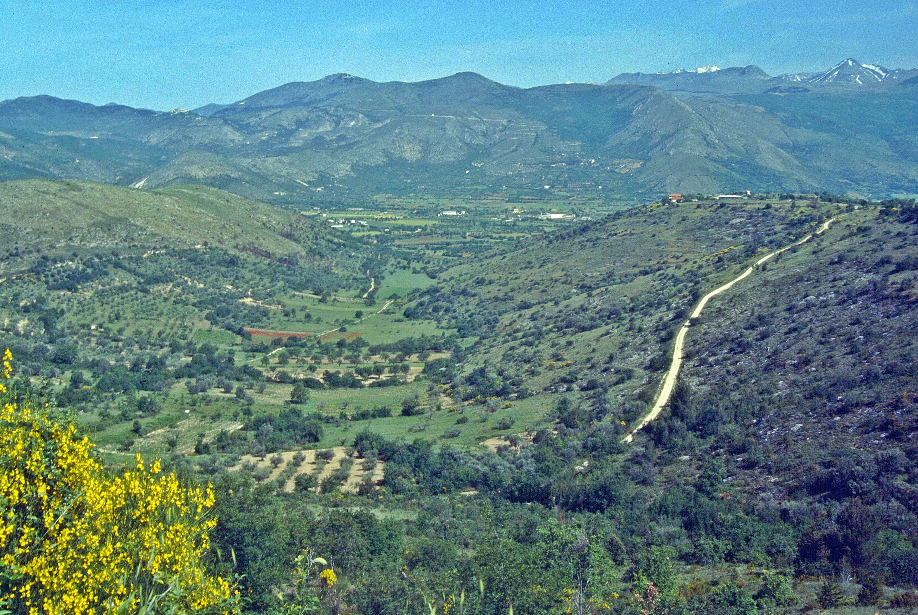 Capestrano